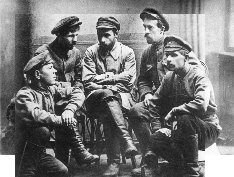 Г.И. Мясников (в центре) среди участников убийства Великого Князя Михаила Александровича. Слева направо: комиссар по национализации и управлению культурно-просветительными учреждениями г. Перми А.В. Марков, помощник начальника Мотовилихинской милиции Н.В. Жужгов, Г.И. Мясников, начальник Пермской милиции, комиссар по охране г. Перми В.А. Иванченко и доброволец Мотовилихинской боевой партийной дружины И.Ф. Колпащиков. г. Пермь, Пермский уезд, Пермская губерния. Июнь 1918 г. ПермГАСПИ. Ф.8043. Оп.1Б. Д.185. Л.1